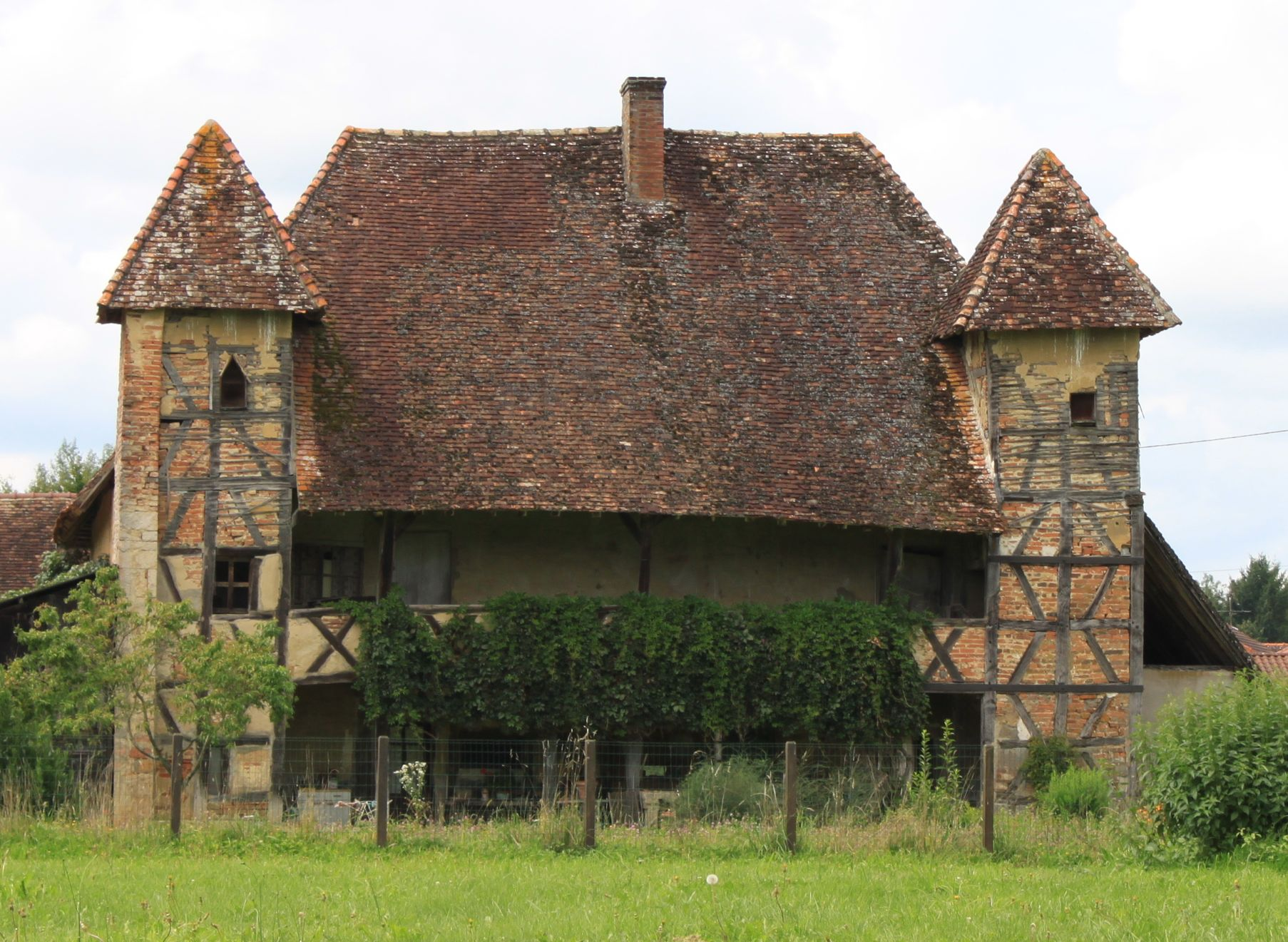 Maison du Bailli, Sagy, Saône-et-Loire, Bourgogne, France